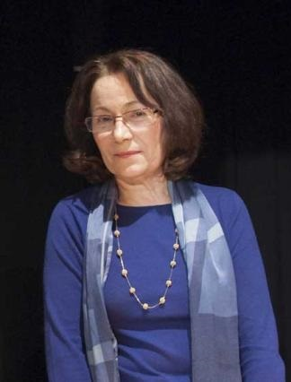 Rosa María Cid López